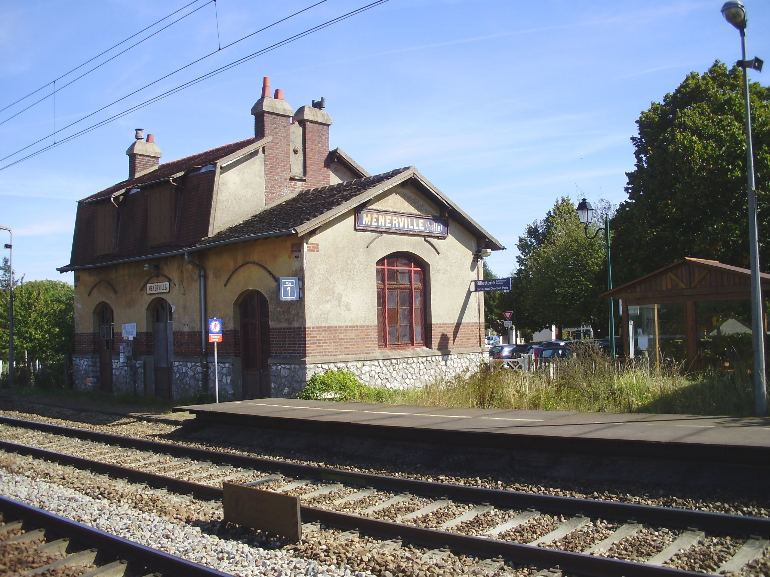 Gare de Ménerville, Yvelines, France (ex-bâtiment voyageurs depuis l'ancien quai vers Mantes-la-Jolie)